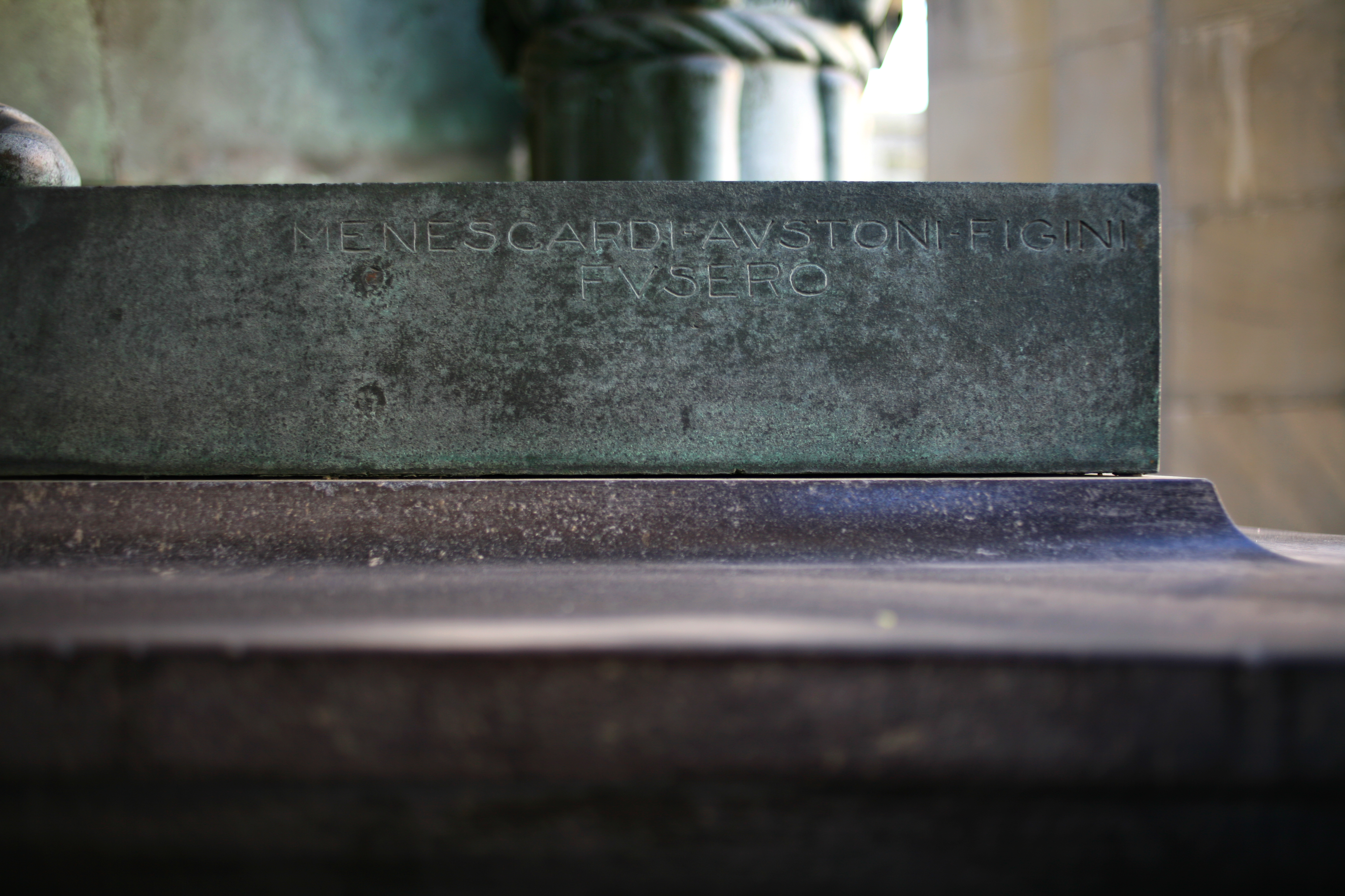 Sigillo della MAF di Menescari, Austoni, Figini che attesta la fusione della grande statua di Adolfo Wildt "Sant'Ambrogio calpesta i sette vizi capitali" posta nel 1928 all'ingresso del Tempio della Vittoria di Milano